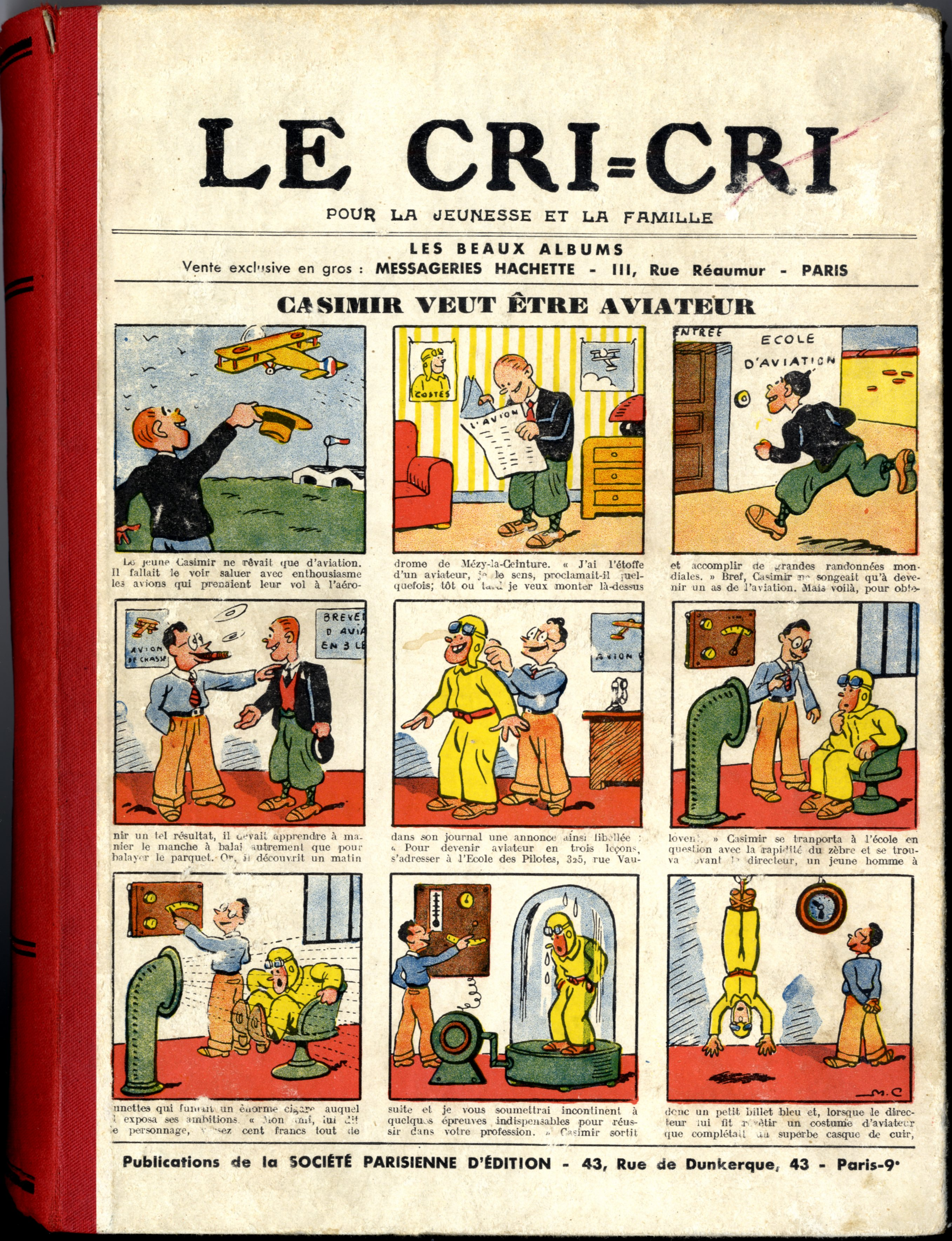 Album regroupant les publications du Cri-cri en 1933 (société parisienne d'édition)